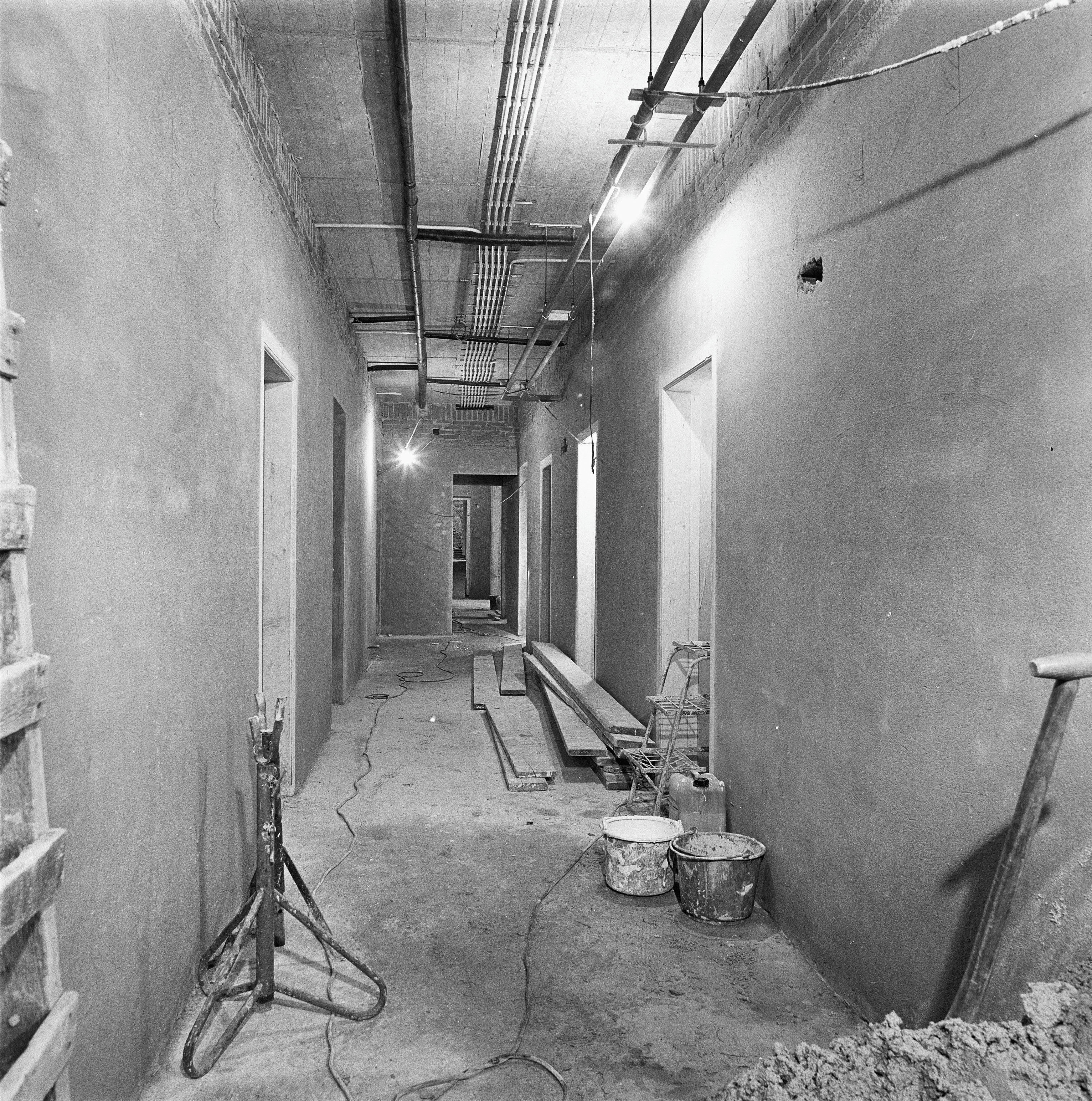 Hernhutterscomplex: interieur kelder